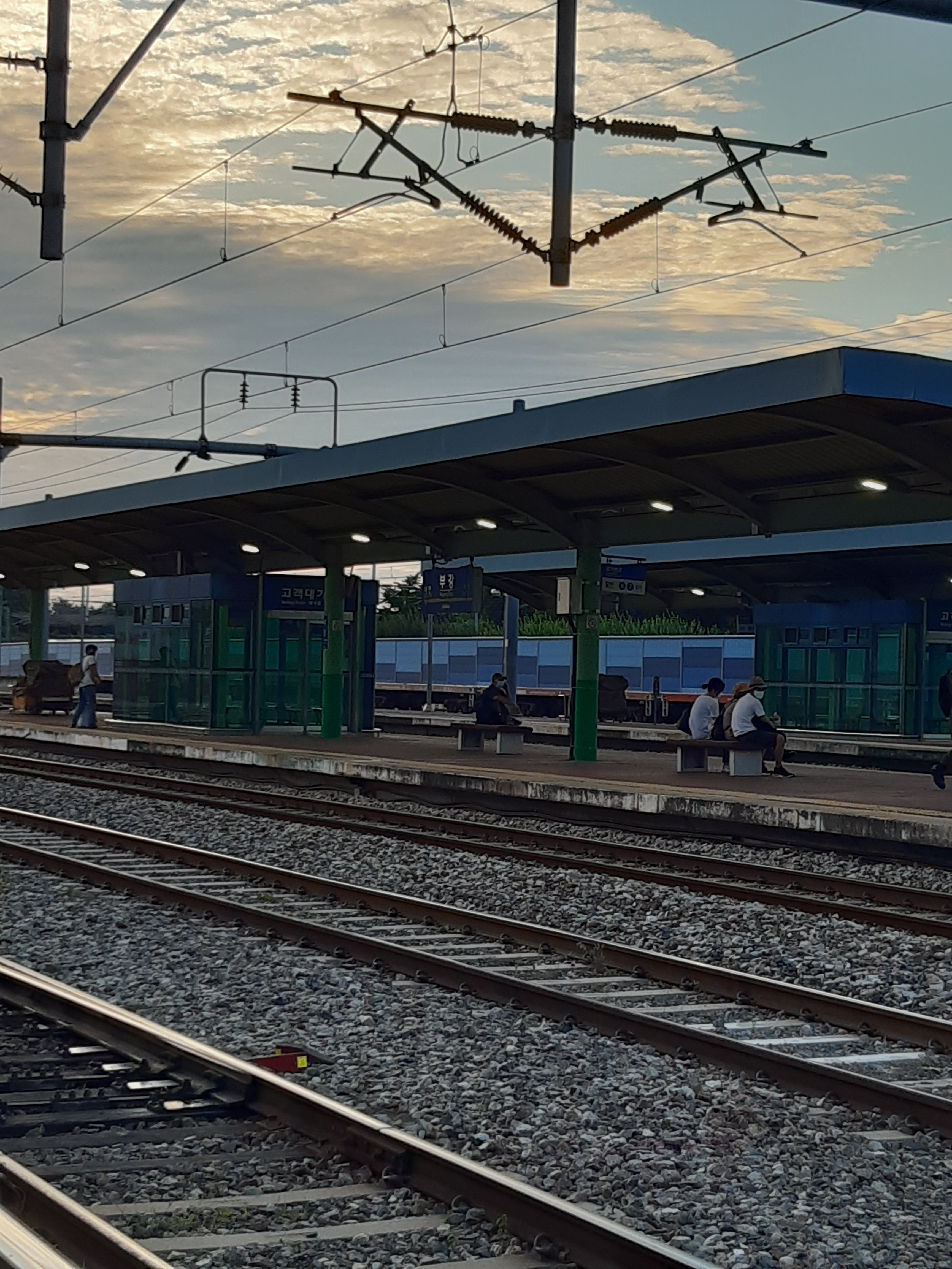 부강역 승강장